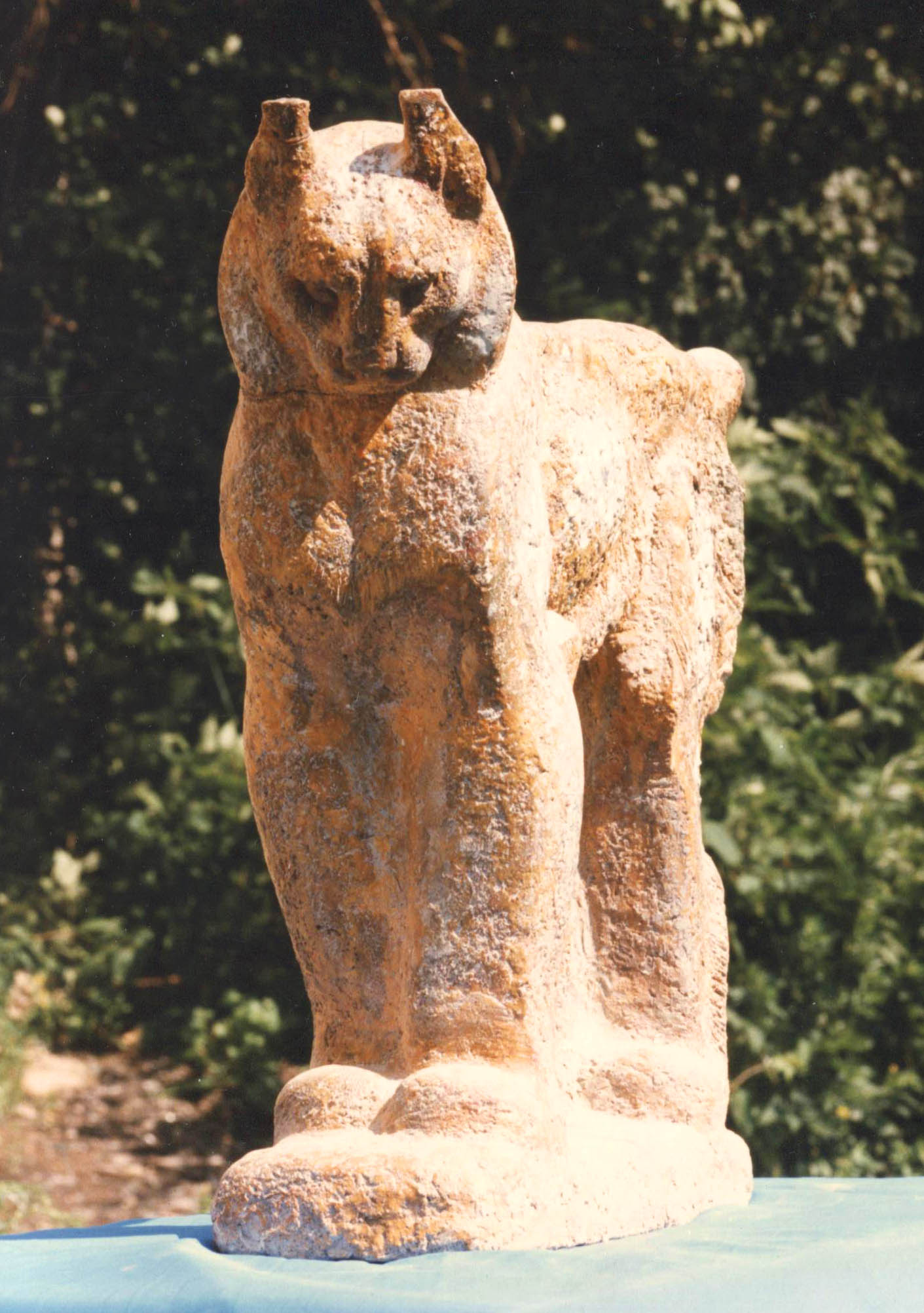 Работа скульптора-художника Николаева Е.В.